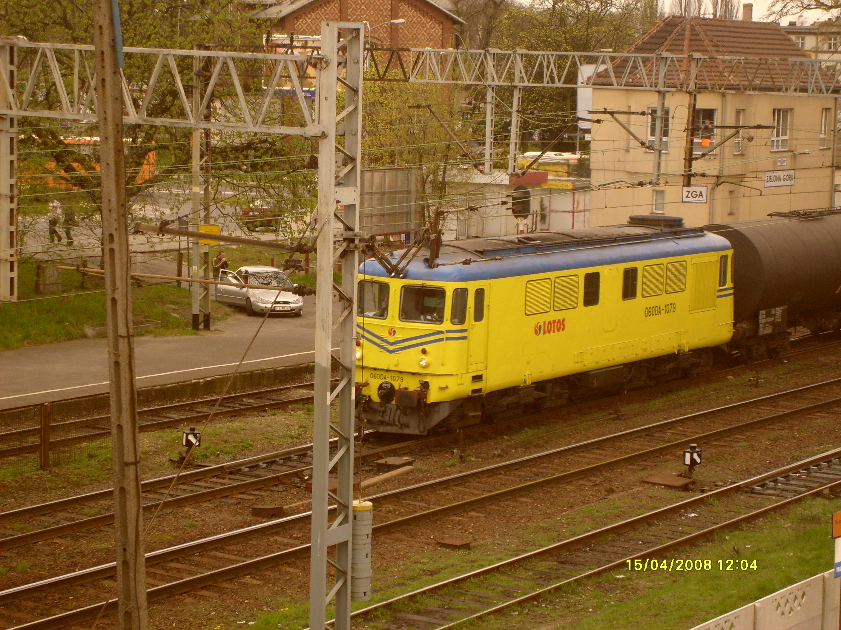 Lokomotywa spalinowa 060DA-1079 w malowaniu przewoźnika Lotos Kolej.